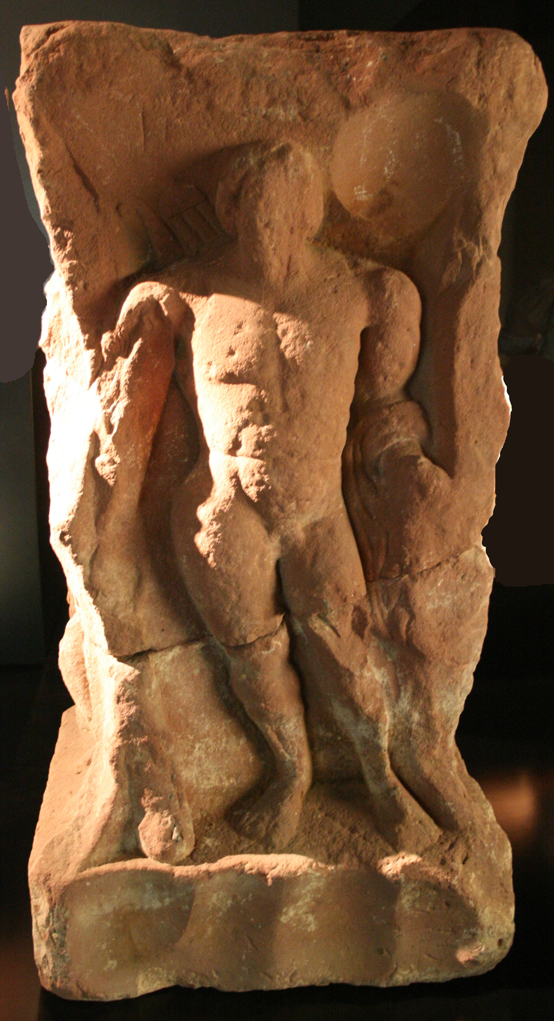 Viergötterstein einer Jupitergigantensäule. Diese Seite stellt Herkules dar. Datiert auf Ende 2. bis erste Hälfte 3. Jahrhundert. Der Stein war in der Kirche Waldmühlbach vermauert und befindet sich jetzt im Römermuseum Osterburken.